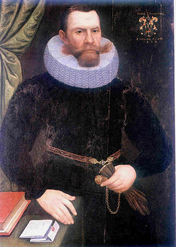 Johann Füchting, Lübecker Kaufmann und Ratsherr (1571-1637). Zu Lebzeiten des Dargestellten entstandenes Porträt.